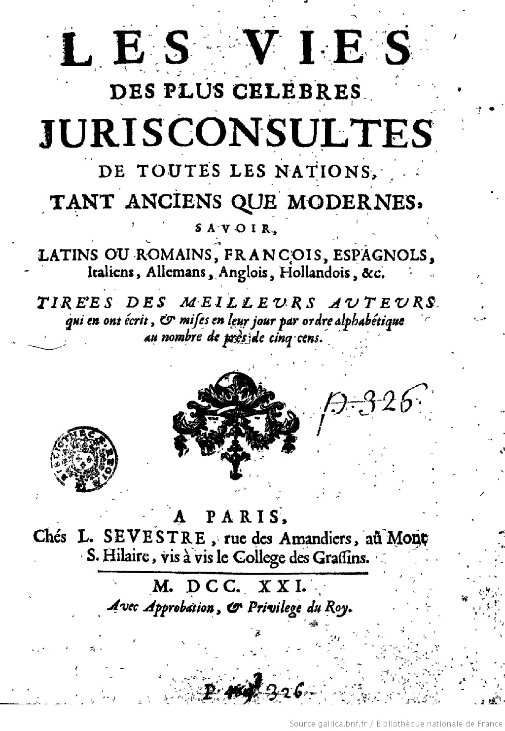 Livre de Pierre Taisand publié par son fils à titre posthume